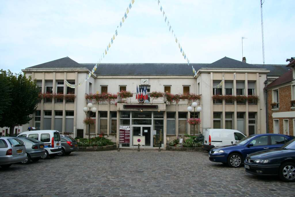 Mairie de Triel-sur-Seine - Yvelines (France)